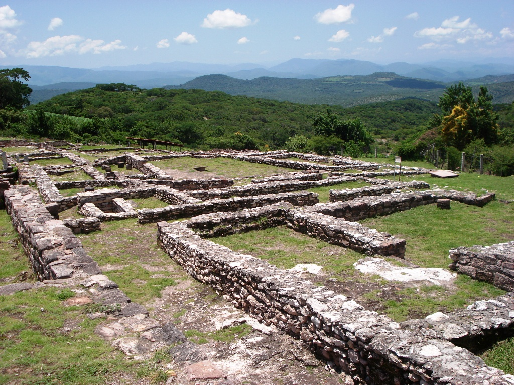 Zona arqueológica de Cuatlajuchitlán, en el estado de Guerrero, México.